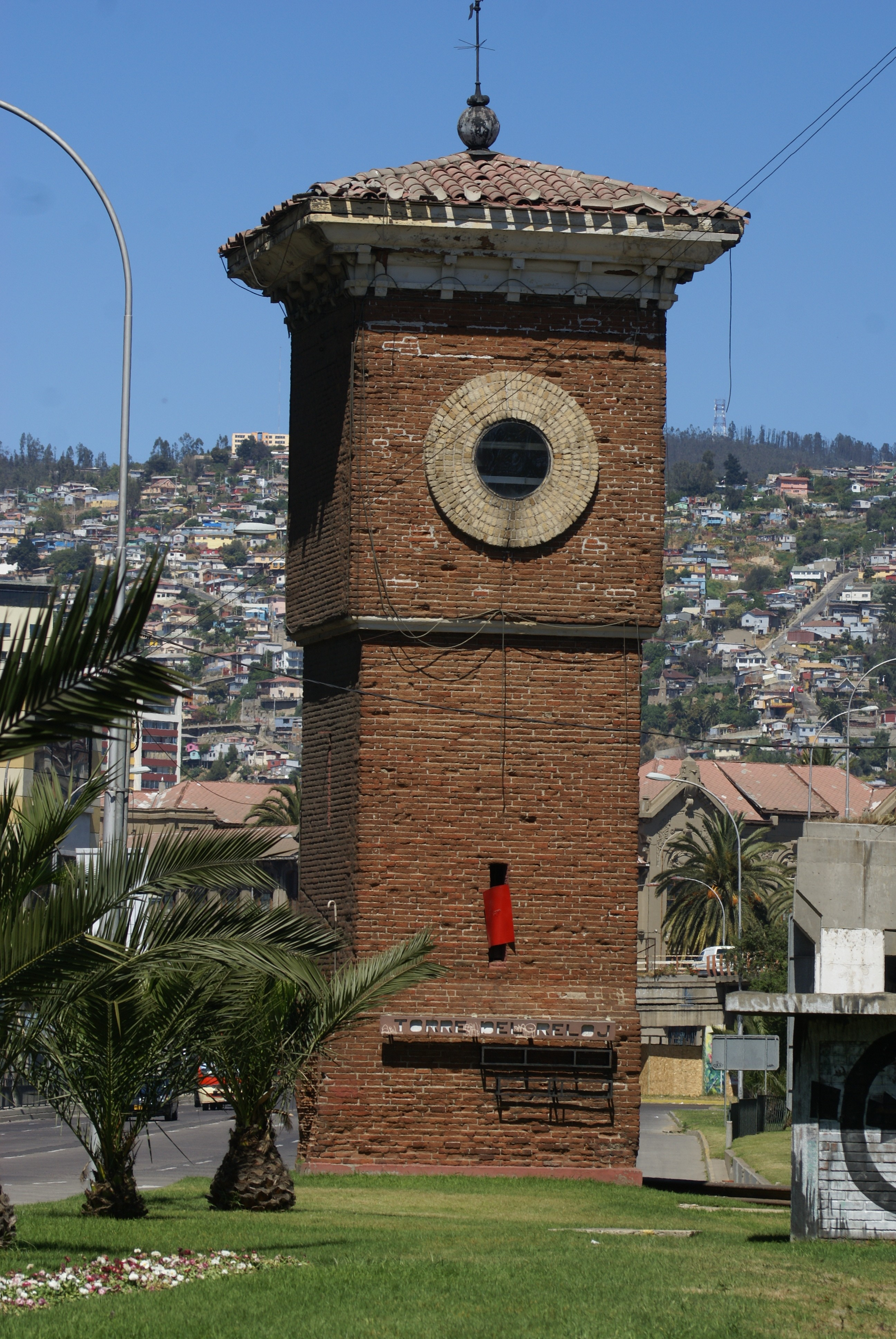 Torre Reloj de la Estación Barón de Ferrocarriles de Valparaíso This is a photo of a national monument in Chile: 615